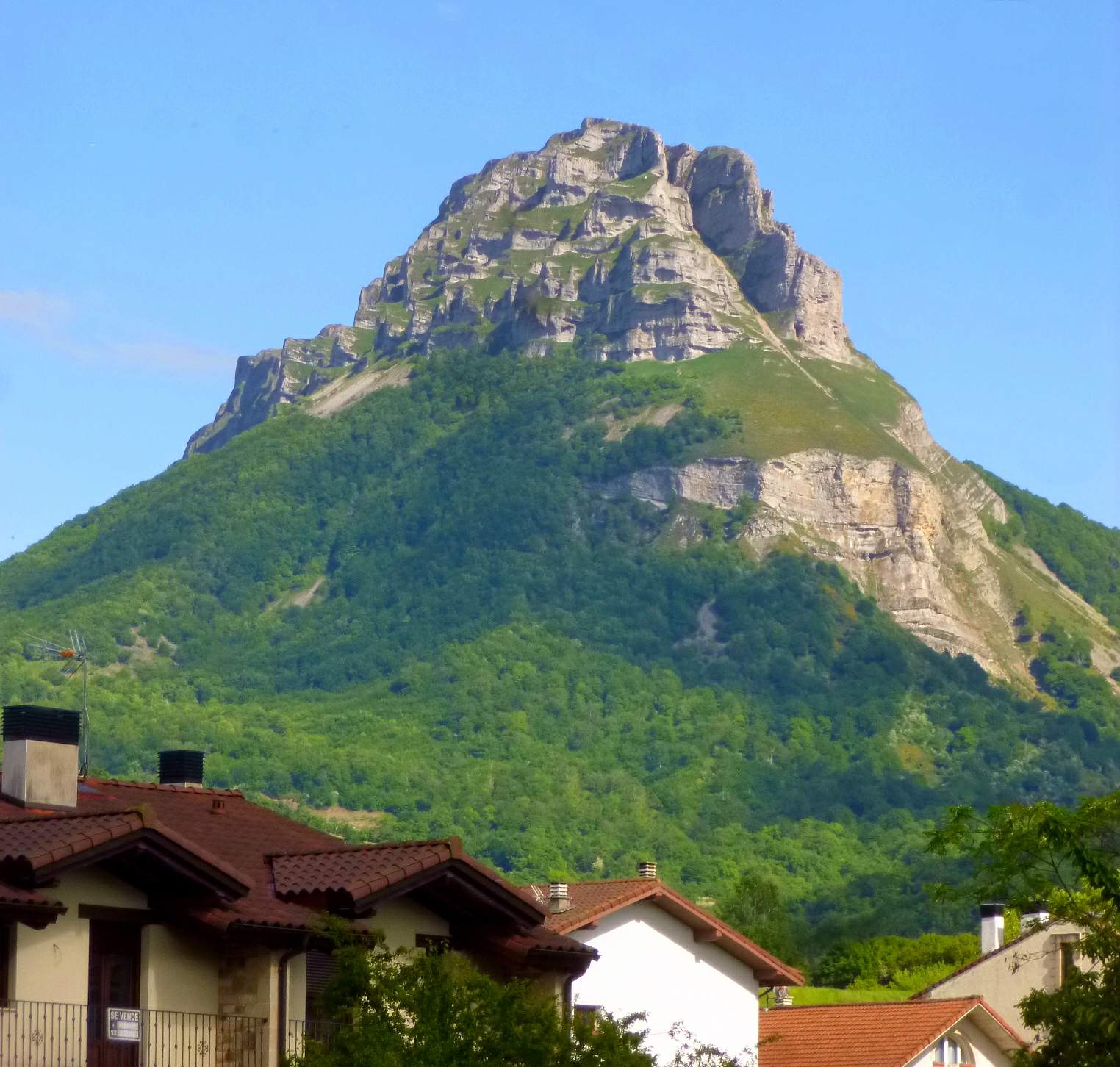 Arbizu (Navarra) - Monte Beriain, Sierra de San Donato, Sierra de Andia